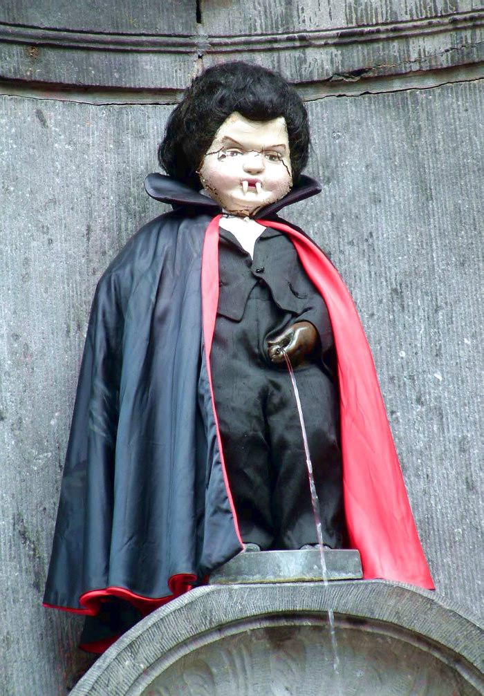 Menneke Pis en Dracula. Auteur: Harry Licence: Art libre (Licence publique générale GNU) Harry